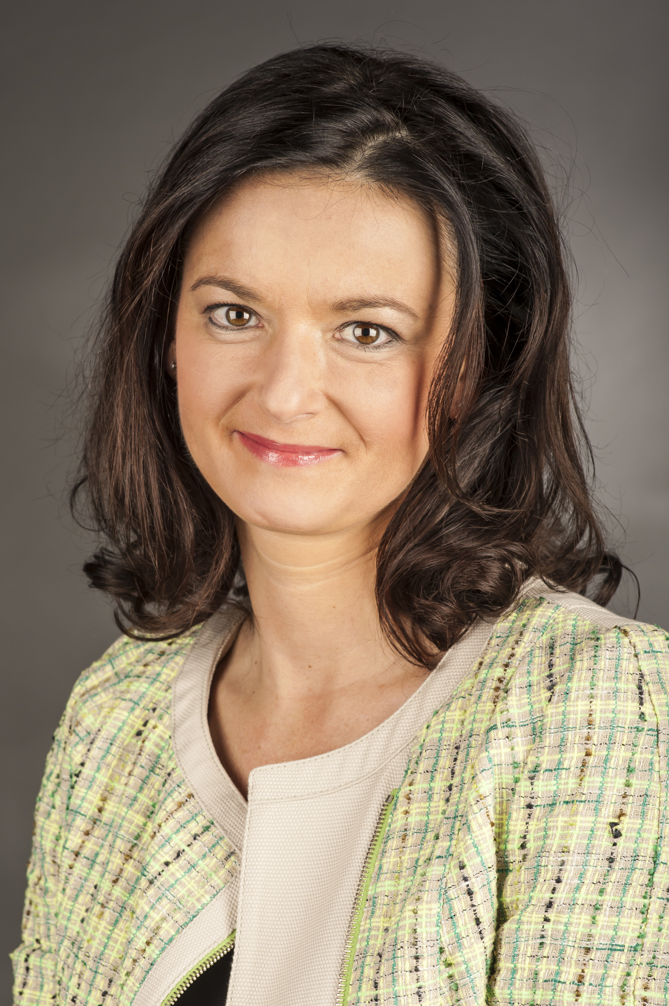 Tanja Fajon